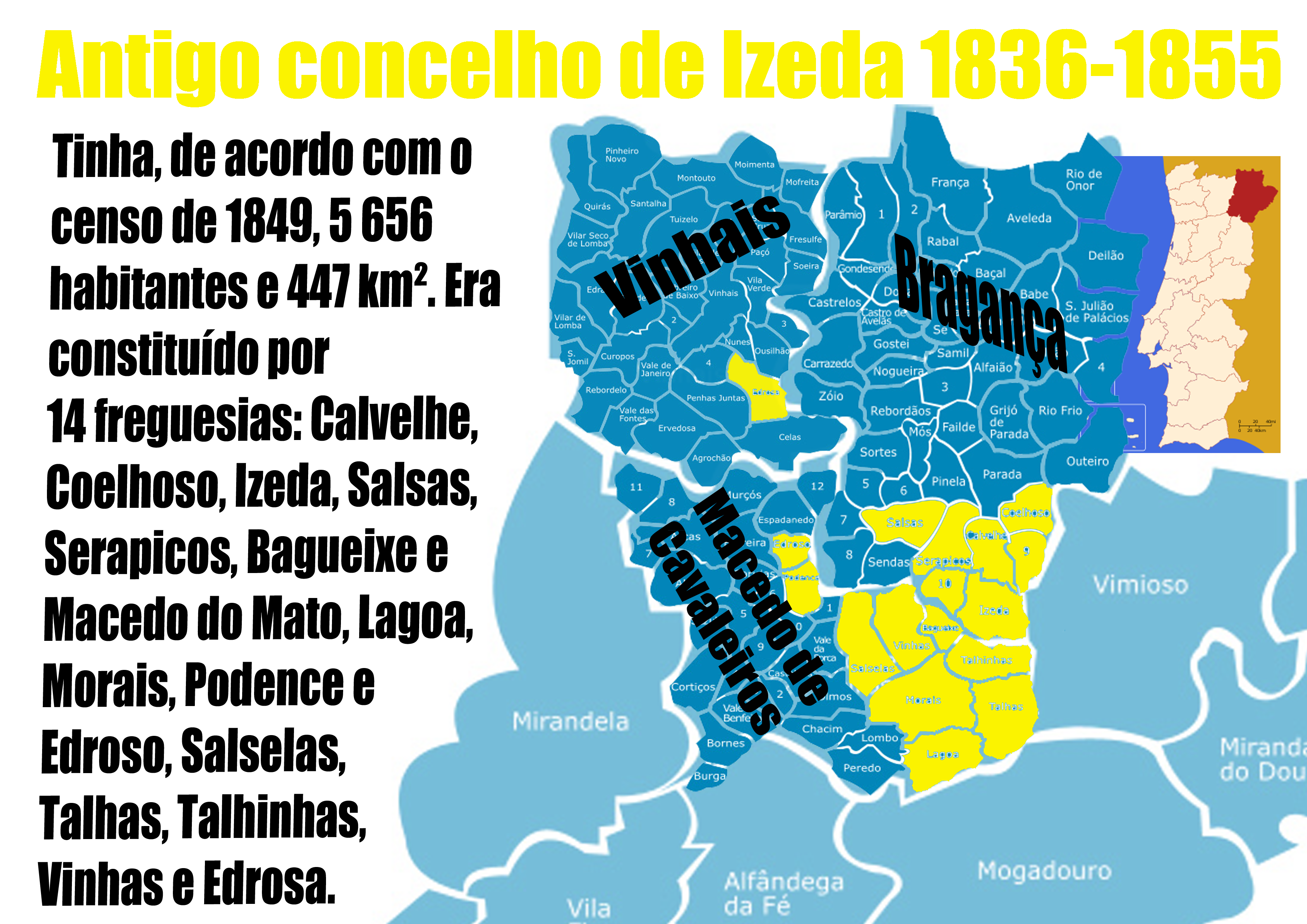 Antigo concelho de Izeda